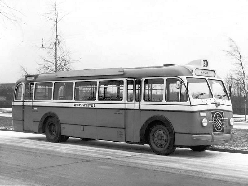 Volvo bus fra 1951